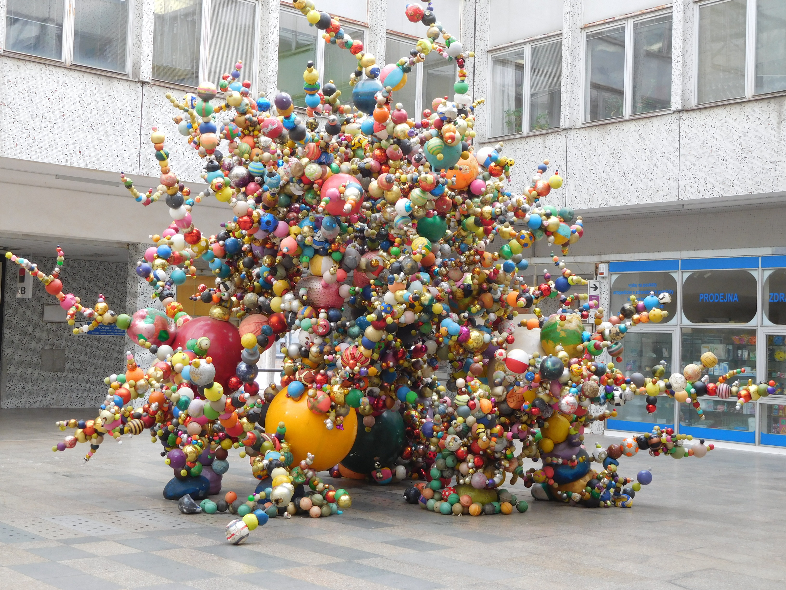 Praha - Motol, Fakultní nemocnice v Motole - plastika (Krištof Kintera: Basic Atomic)